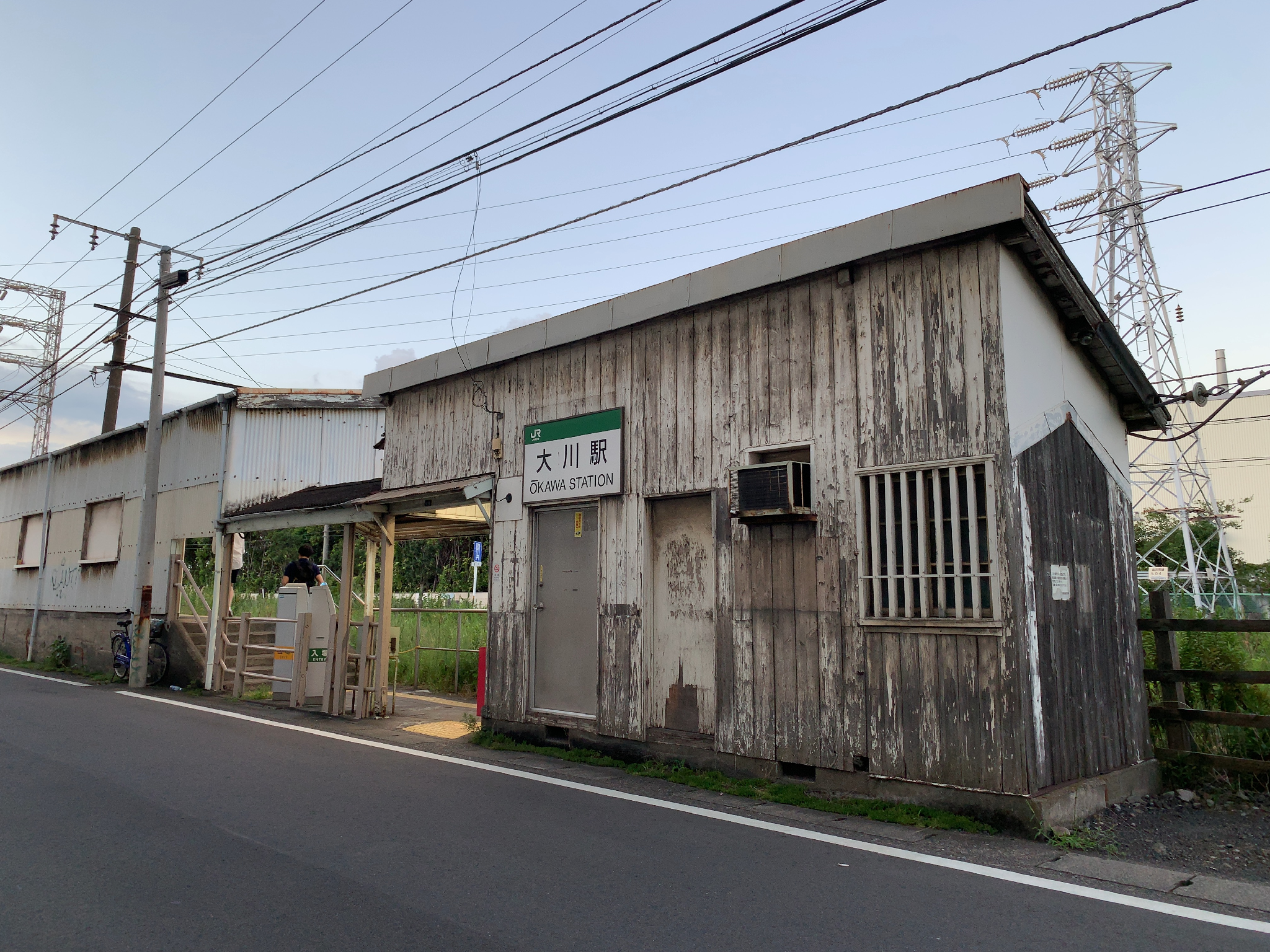 JR大川駅 駅舎